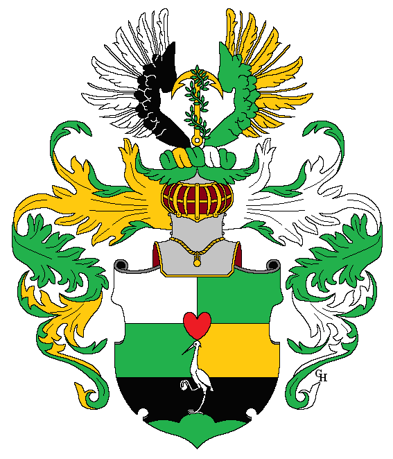 Wappen des aus Griechenland stammenden Kaufmanns Geórgios Ioánnes Karagiánnis (1743–1813), verliehen anlässlich seiner Erhebung in den Reichsadelsstand mit dem Namen "Karajan" durch den Reichsvikar Kurfürst Friedrich August III. von Sachsen 1792. Zeichnung von Gerd Hruška ( Für weitere Informationen zu dieser Standeserhebung siehe (